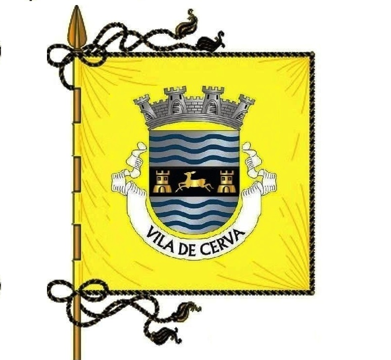 Bandera de la Villa de Cerva